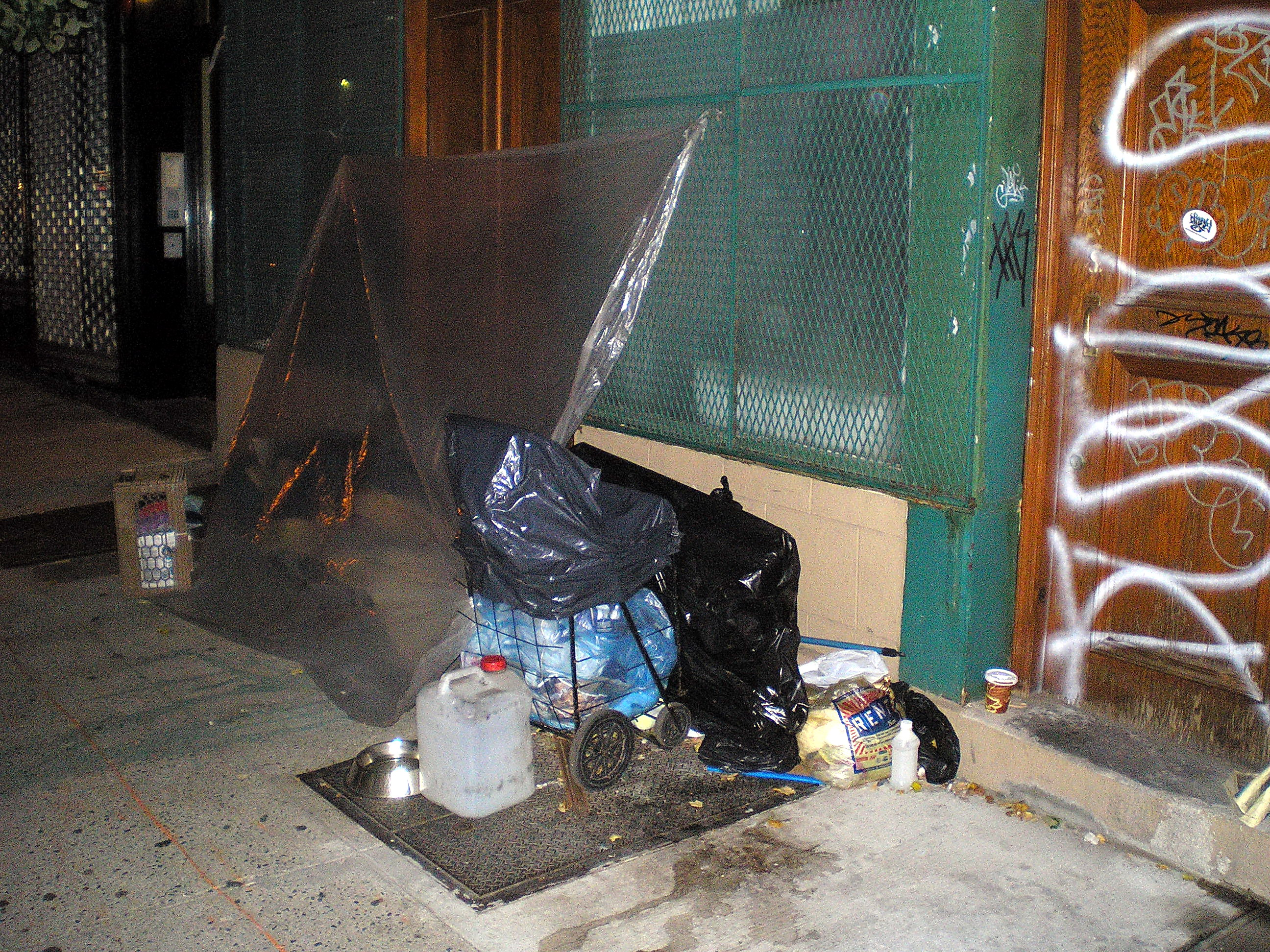 Street Sleeper 2 by David Shankbone